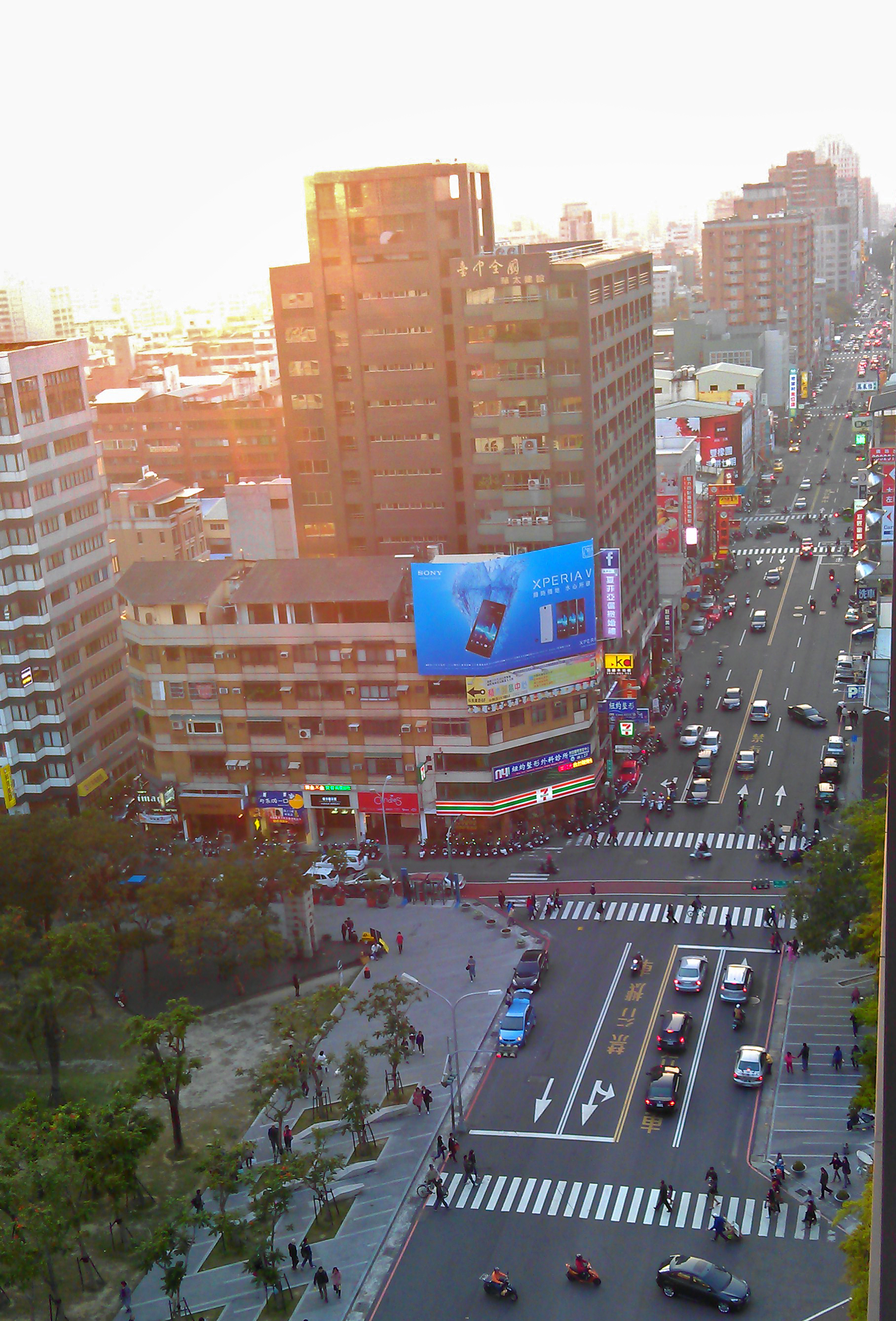 臺中市公益路市民廣場段的夕陽